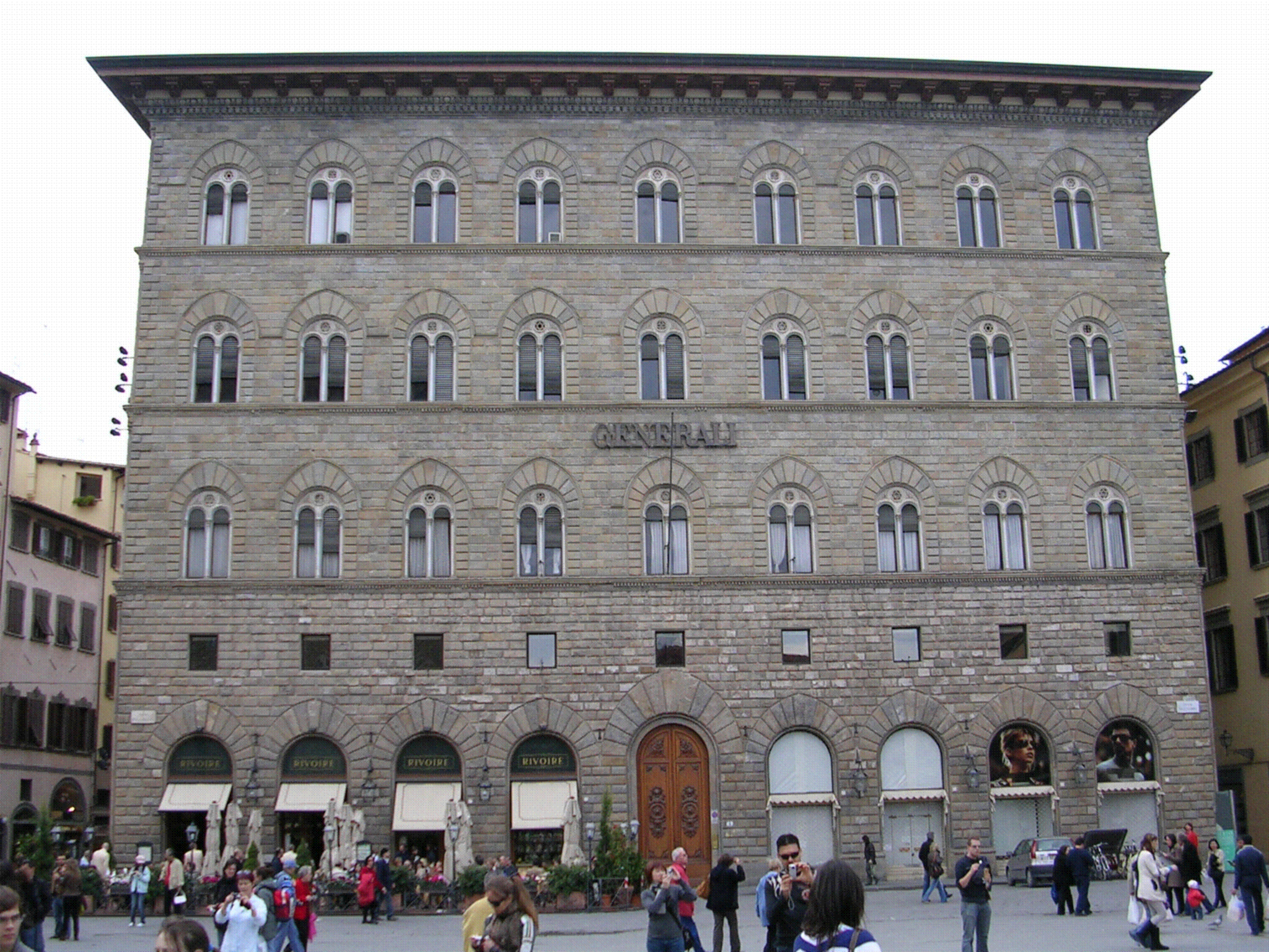 Il Palazzo delle Assicurazioni Generali, Firenze. Costruito nel 1871, in stile rinascimentale. Photographed by Giano who releases all rights into public domain